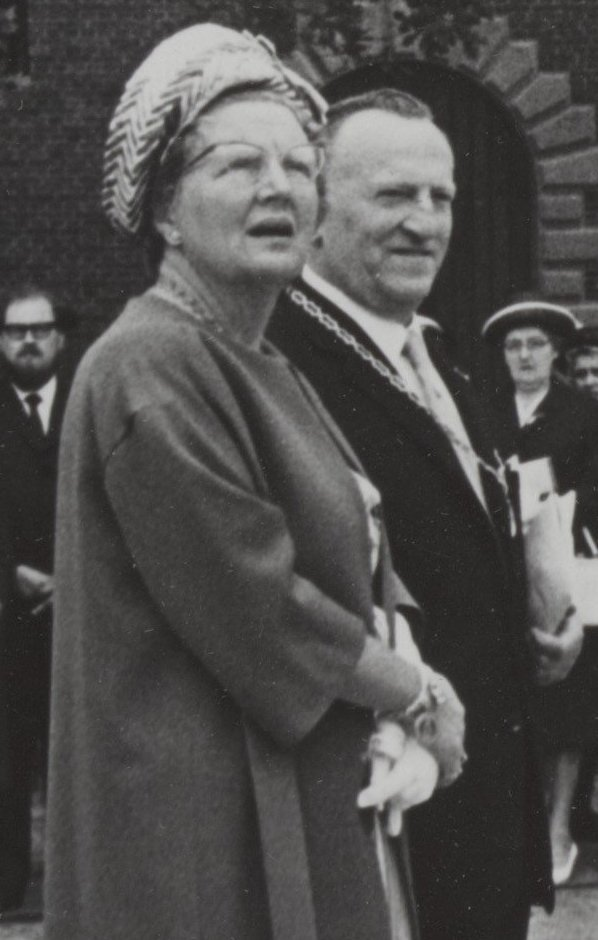 Collectie / Archief : Fotocollectie Elsevier Reportage / Serie : [ onbekend ] Beschrijving : koninklijk huis, koninginnen, onthullingen, standbeelden, kerken, burgemeesters, Gogh V., , Manders G.J.a. Datum : 28 mei 1964 Locatie : Noord-Brabant, Zundert Trefwoorden : burgemeesters, kerken, koninginnen, koninklijk huis, onthullingen, standbeelden Persoonsnaam : Gogh V., Juliana (koningin Nederland), Manders G.J.a., Zadkine, Ossip Fotograaf : Pot, Harry / Anefo Auteursrechthebbende : Nationaal Archief Materiaalsoort : Foto (zwart/wit) Nummer archiefinventaris : bekijk toegang 2.24.05.02 Bestanddeelnummer : 015-1047